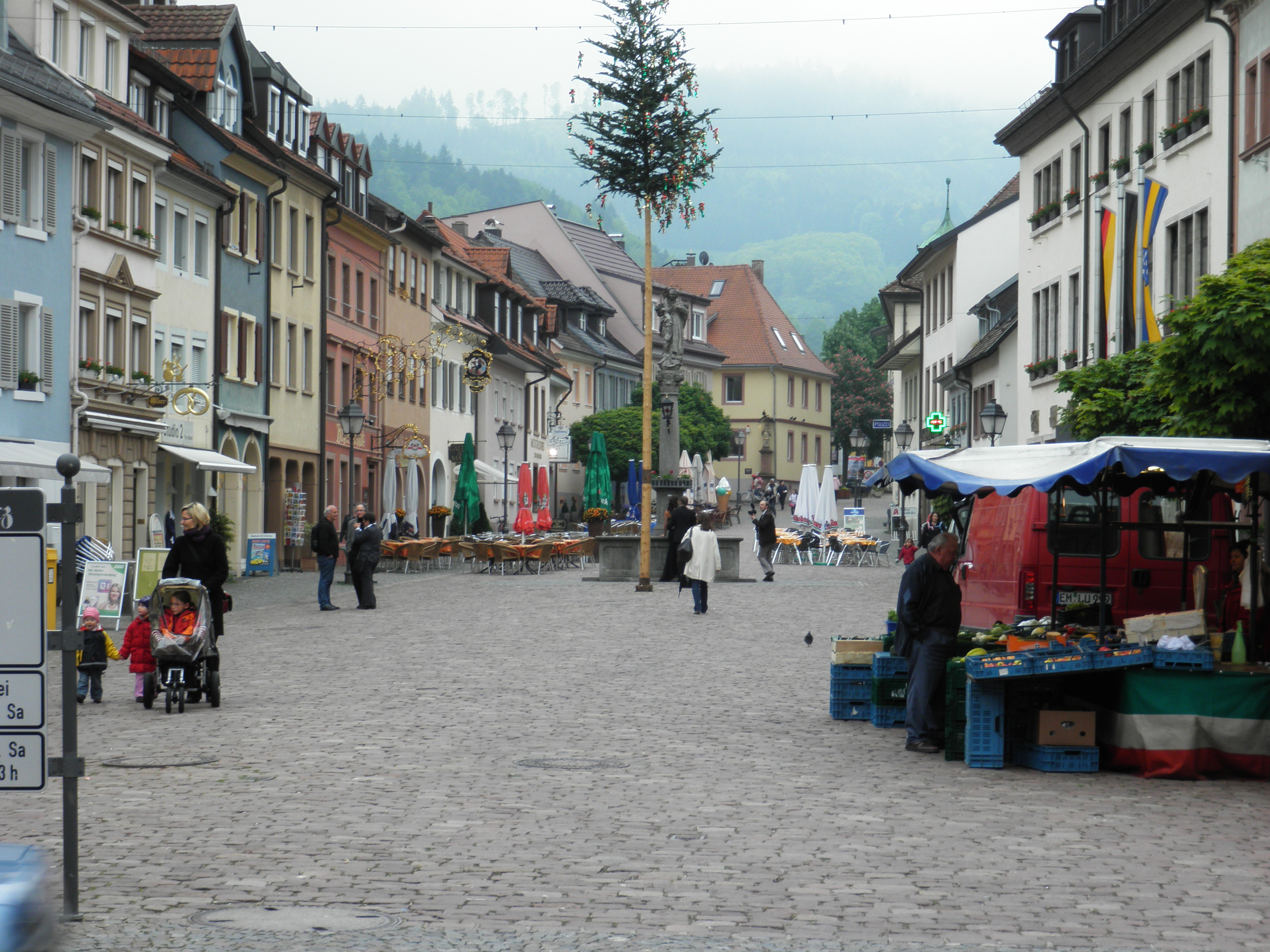 Центральная площадь Вальдкирха, Баден-Вюртемберг, Германия